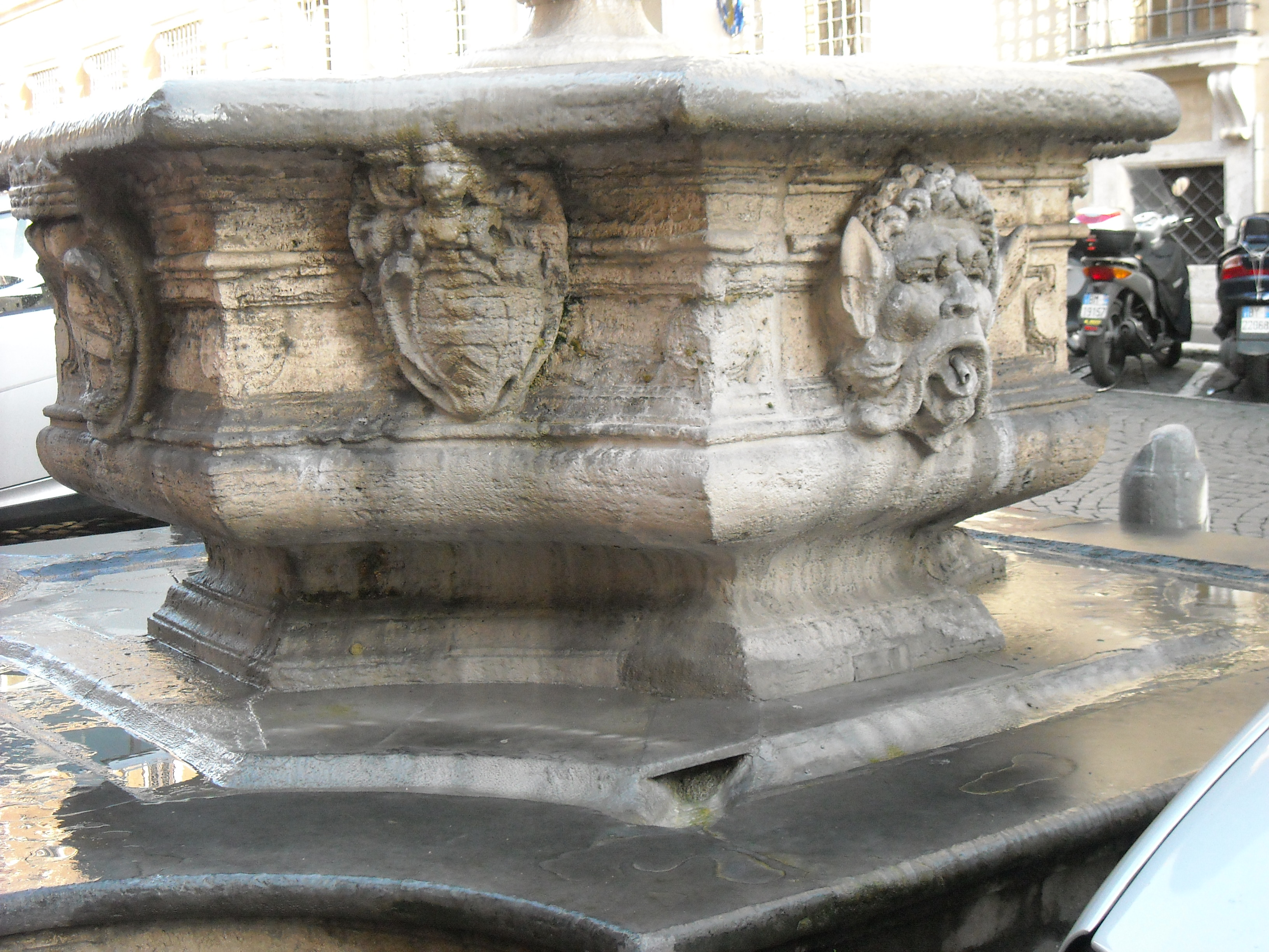 Particolare dei mascheroni e degli stemmi sulla vasca principale della fontana